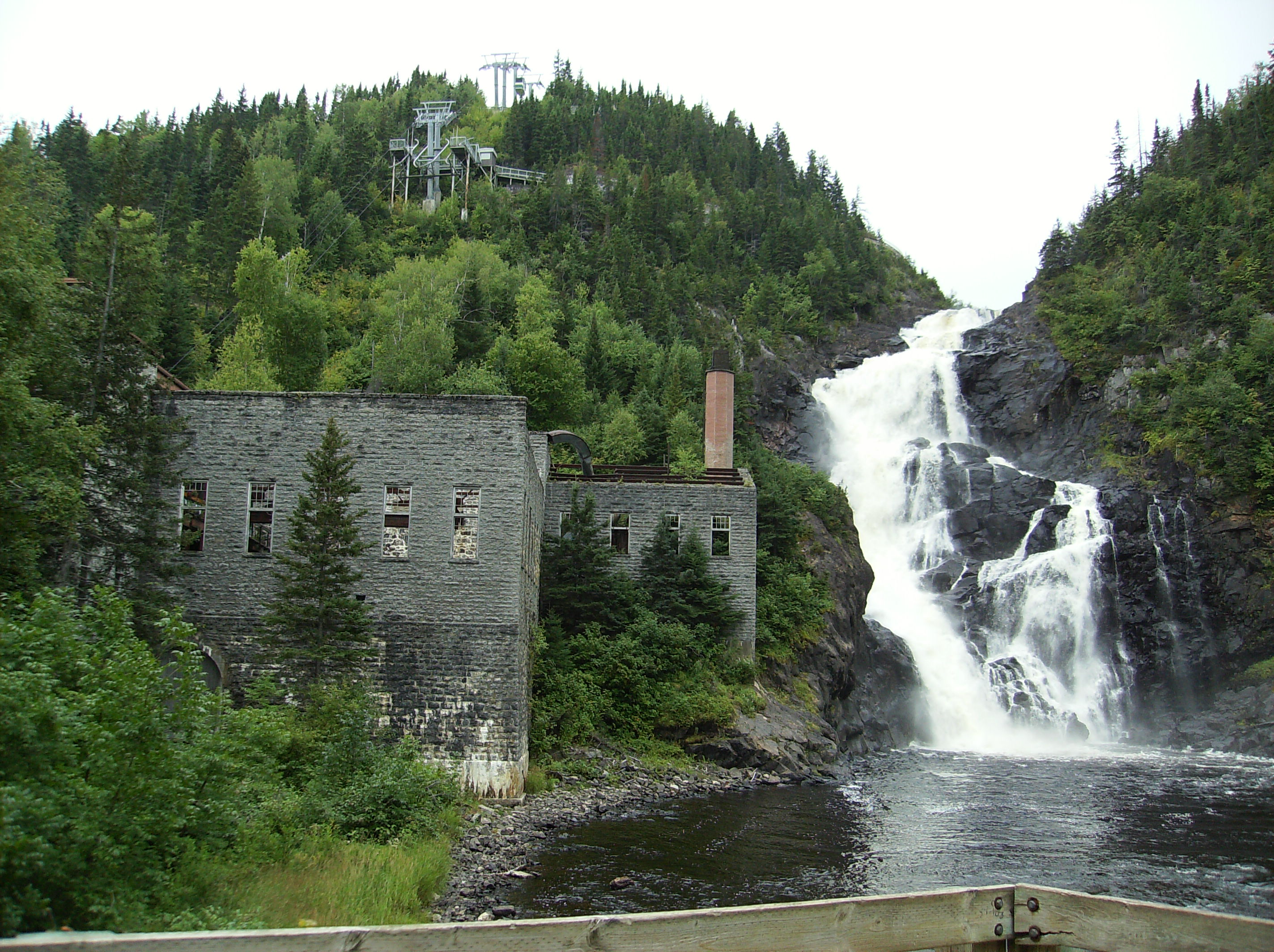 Chute Ouiatchouan, Val Jalbert